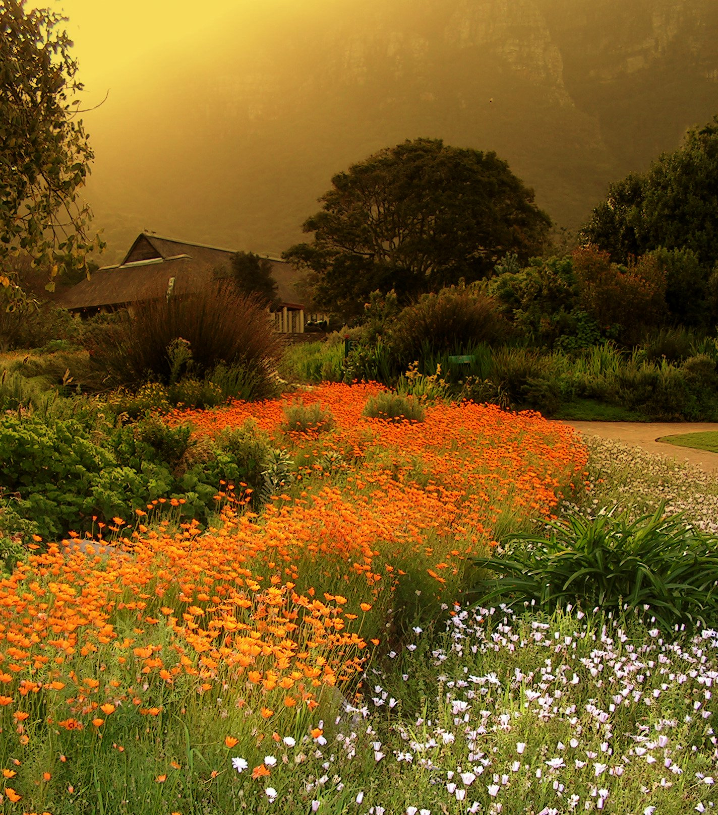 'n Toneel in Kirstenbosch botaniese tuin.